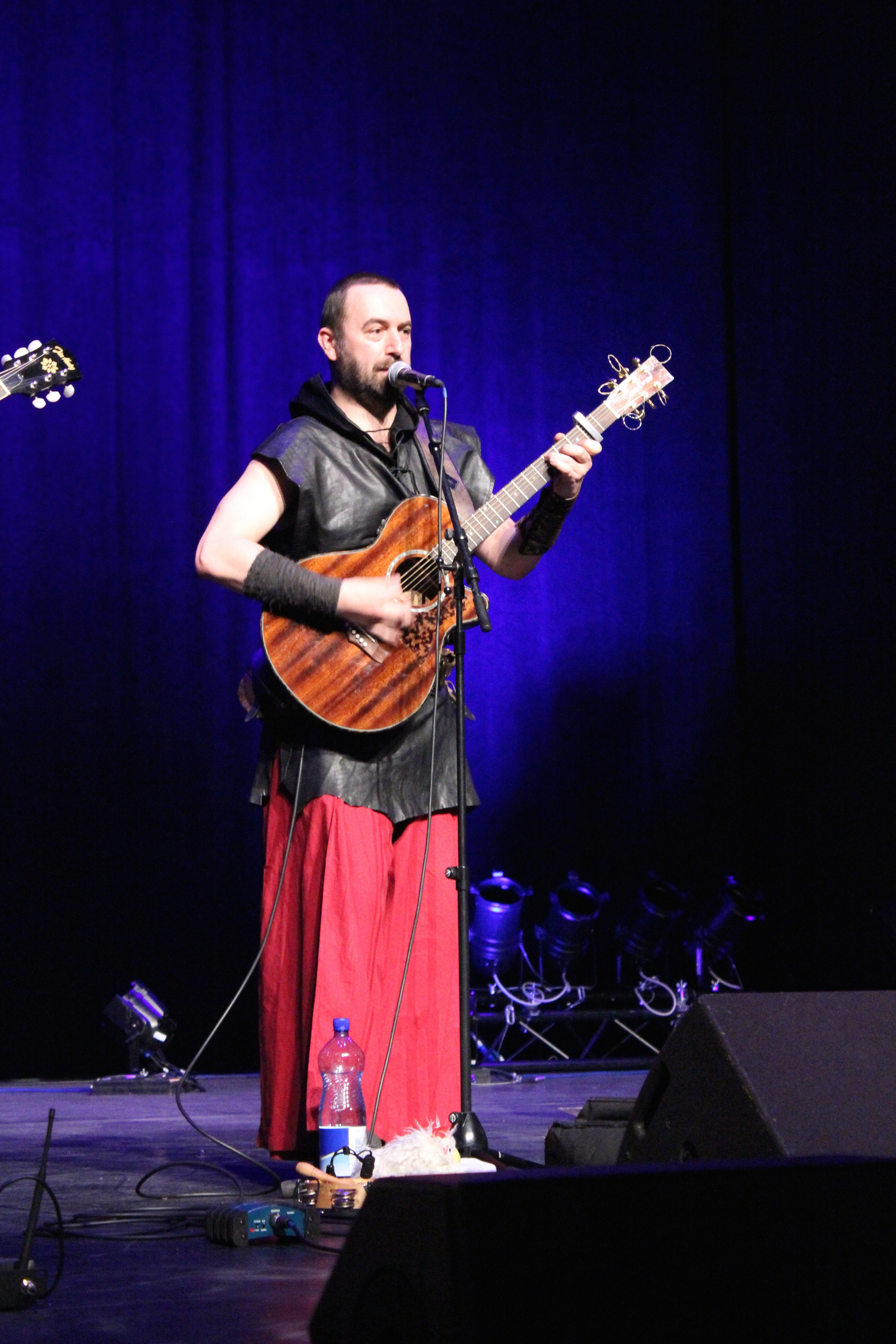 Le Naheulband en concert à l’Auditorium Stravinski à Montreux (Suisse), pendant Polymanga, le 20 avril 2014.